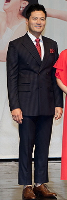 더 이상은 못 참아 제작발표회